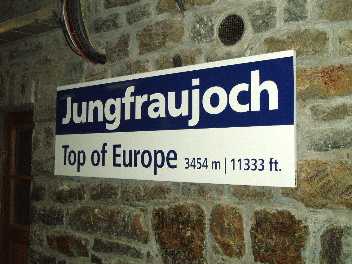 Jungfraujoch